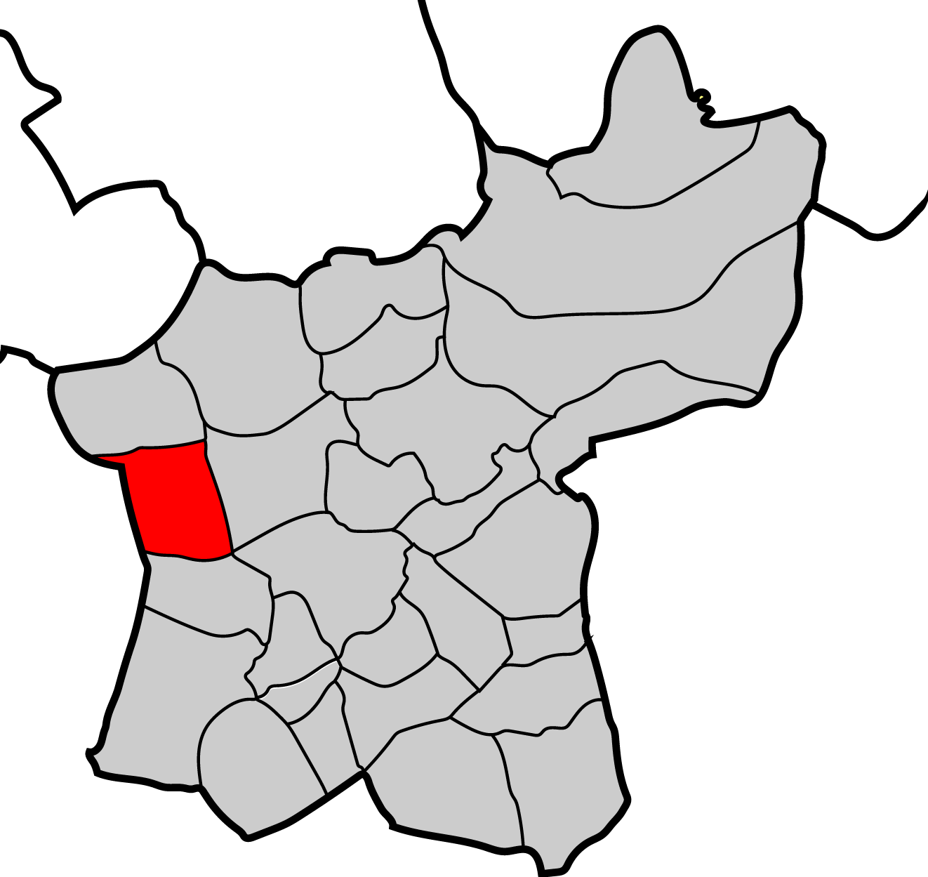 Mapa parroquia de Recesende Baralla